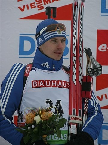 Евгений Устюгов на подиуме